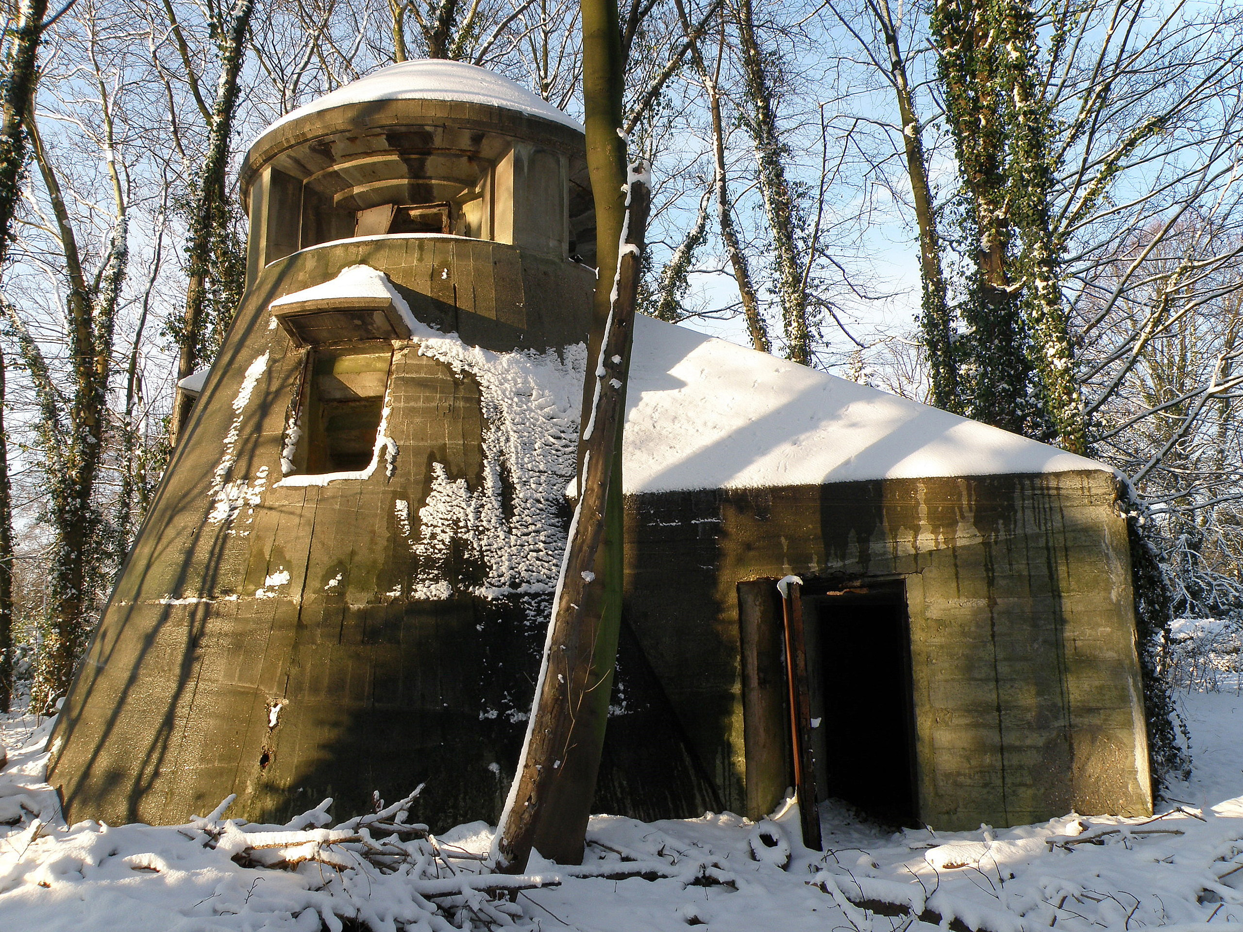 Antwerpen, distr. Deurne. Duitse commandobunker uit WOII nabij vliegveld van Deurne, Drakenhoflaan nr. 194.